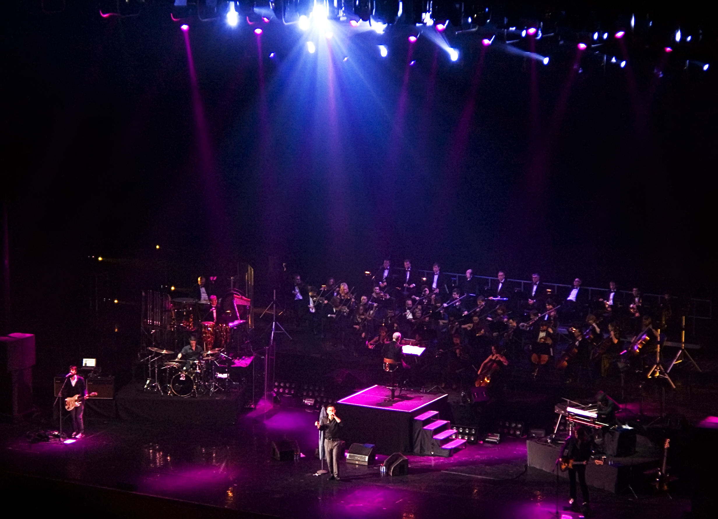 ОЕ в Кремле.